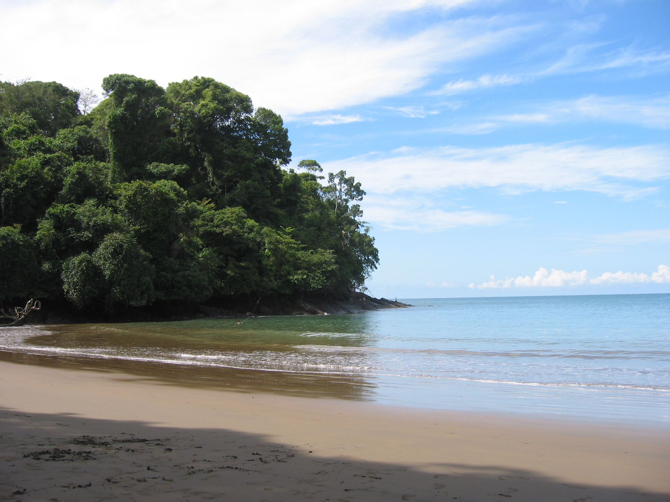 Playa Piñuela en el Parque Marino Ballena, Costa Rica